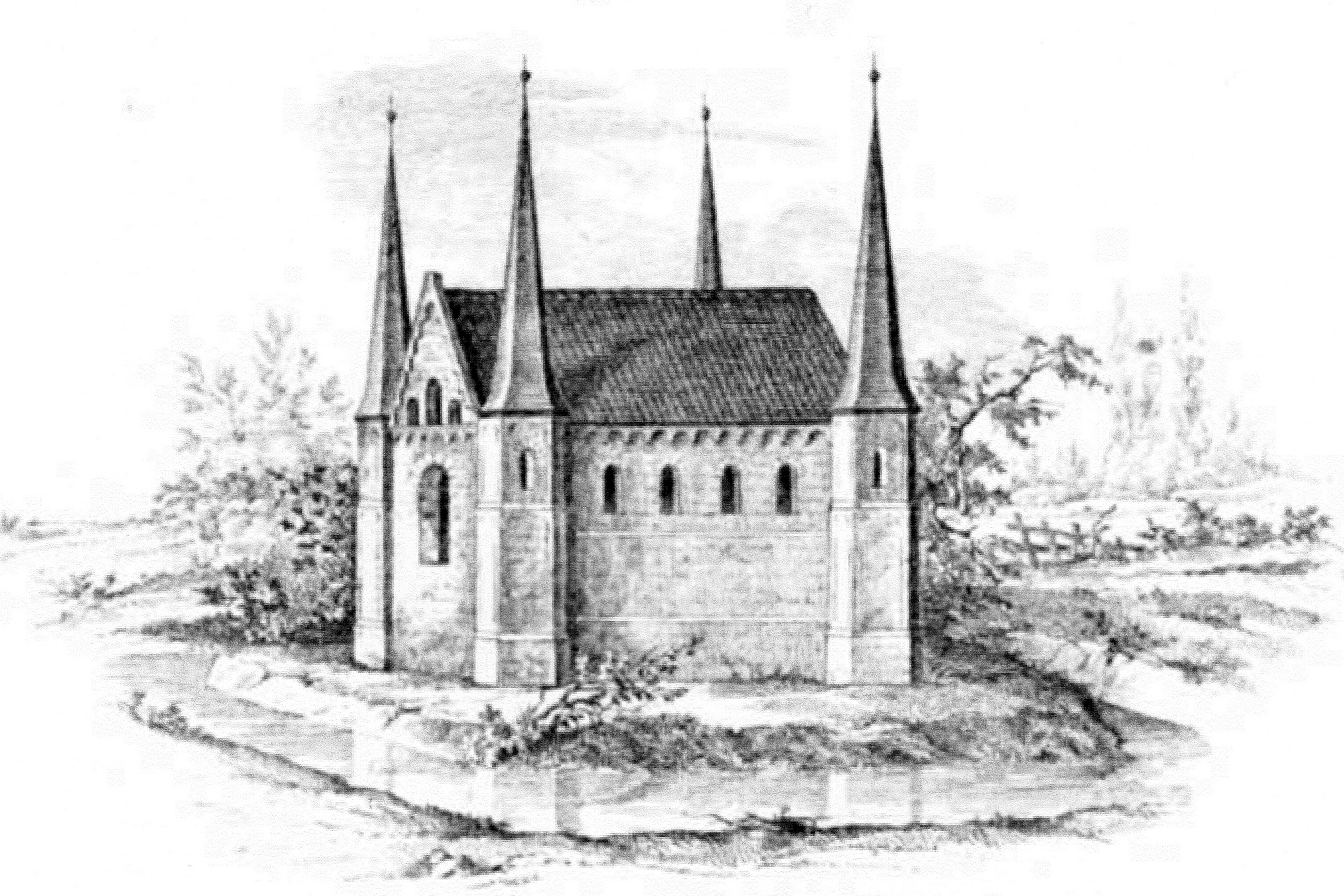 Herrenhaus Kletkamp, Zeichnung von Köhler und Roisternitz 1862